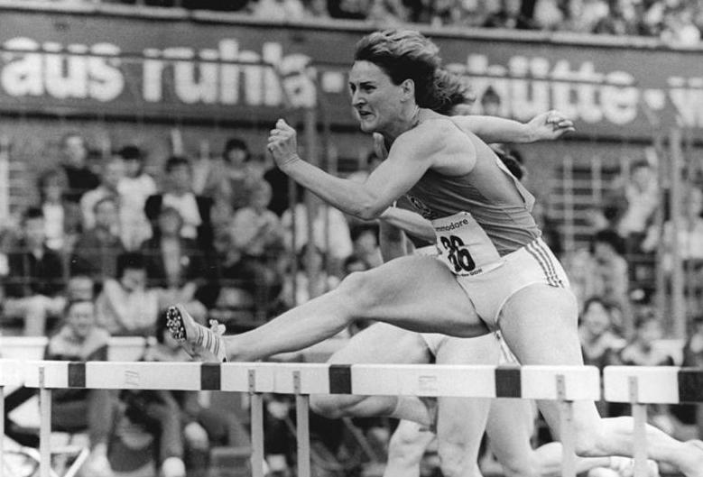 Cornelia Oschkenat ADN-ZB Kluge 25.6.88 Rostock: 39. DDR-Meisterschaften in der Leichtathletik - Mit der persönlichen Jahresbestleistung von 12,53 Sekunden wurde Cornelia Oschkenat vom SC Dynamo Berlin neuer DDR-Meister über 100 Meter Hürden.